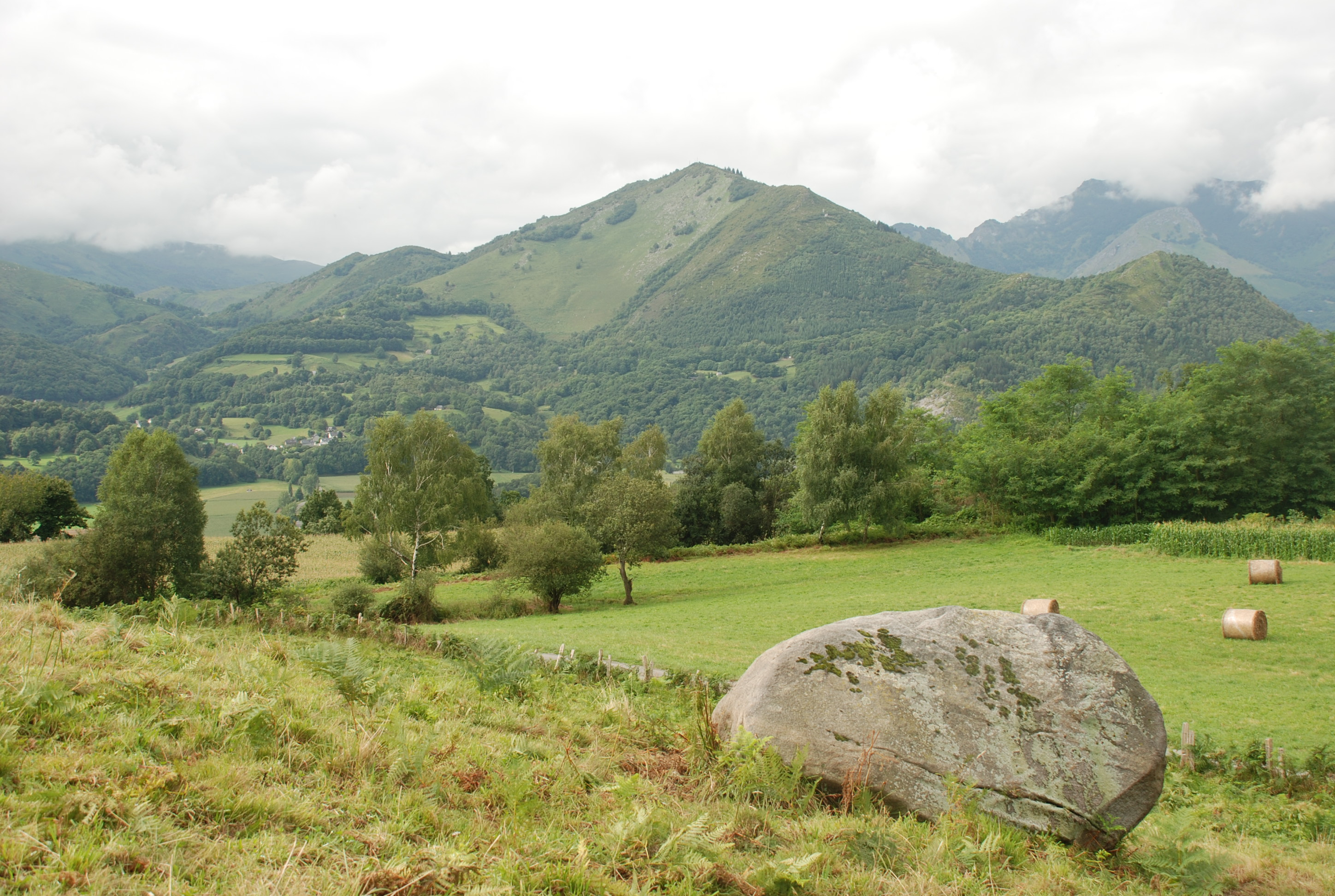 Quartier du Coures, partie de Lézignan en plateau au dessus de la plaine en prolongement de la commune de Bourréac sur la ligne collinaire. D'anciennes landes ont été mises en culture et sont exploitées par des agriculteurs de Bourréac et de Lézignan. On notera l'existence du gros bloc de granit morainique et la présence de fougères sur un sol naturellement humique et acide. A l'arrière plan on voit le Pic du Jer, au pied duquel se situe le village de Jarret.